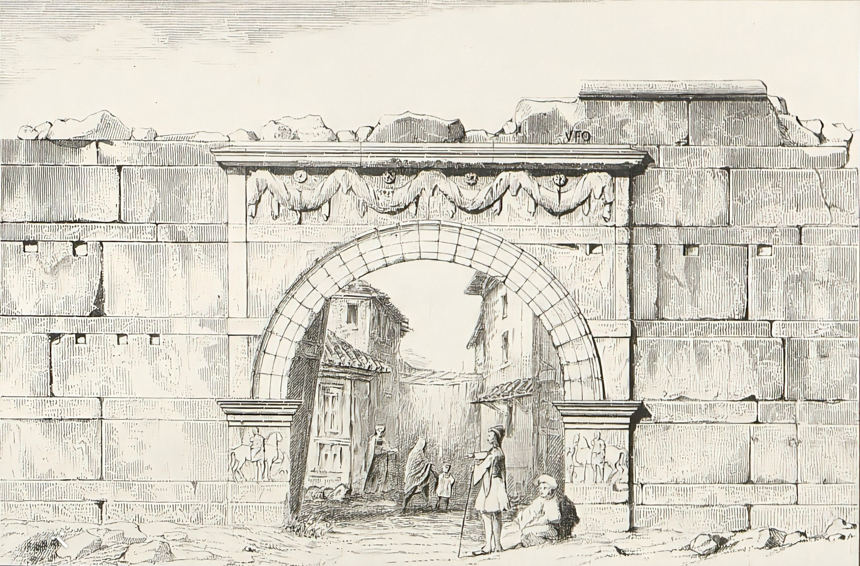 La Porte d'Or à Thessalonique, gravure de l'arc de triomphe incorporé dans le rempart oriental de la ville.